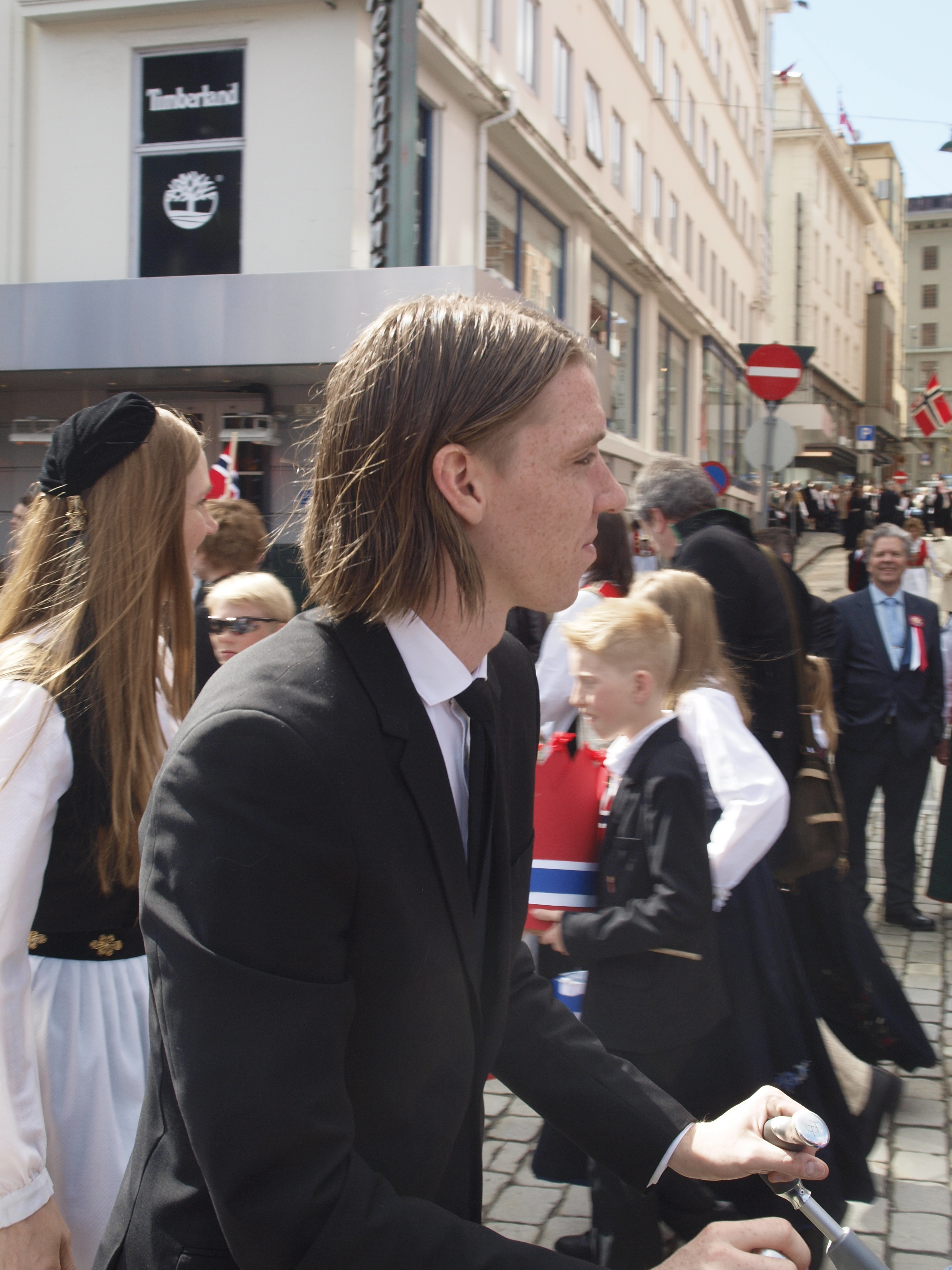 Birkir Sævarsson